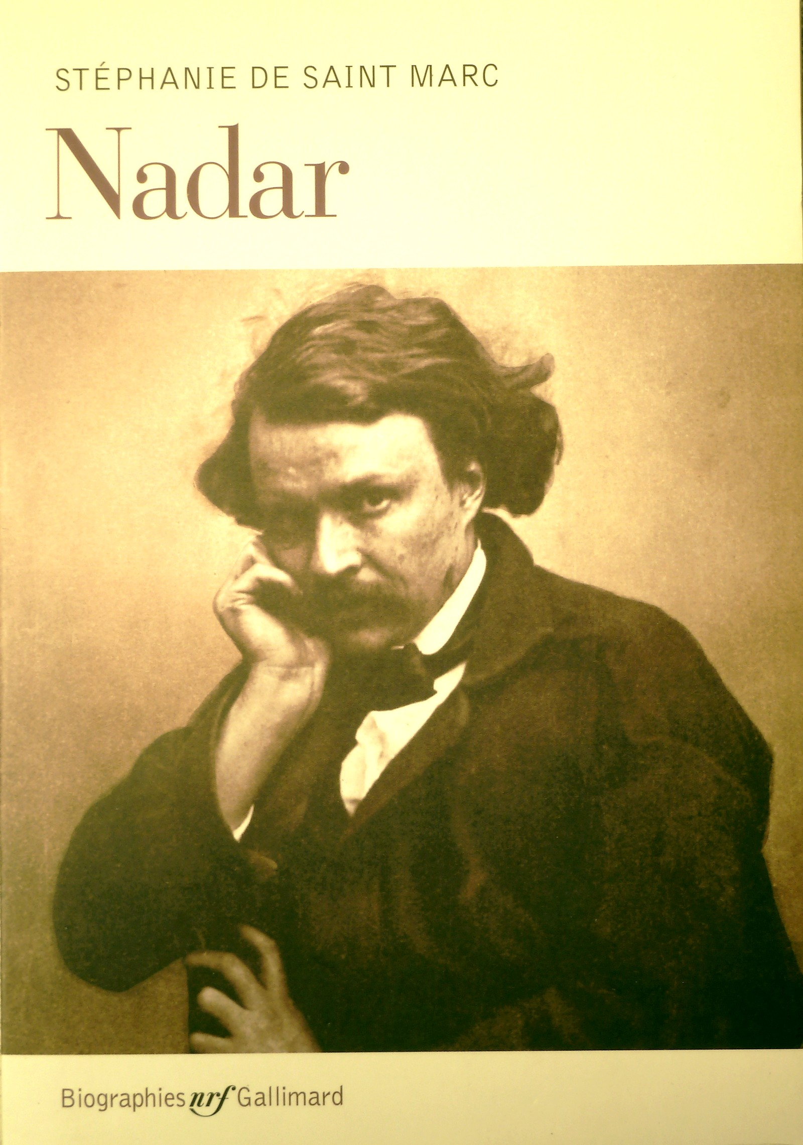 Collection Gallimard - Biographie. Nadar de Stéphanie de Saint Marc (2010) - Photo : Nadar (Félix Tournachon) autoportrait vers 1885 - J. Paul Getty Museum, Malibu.